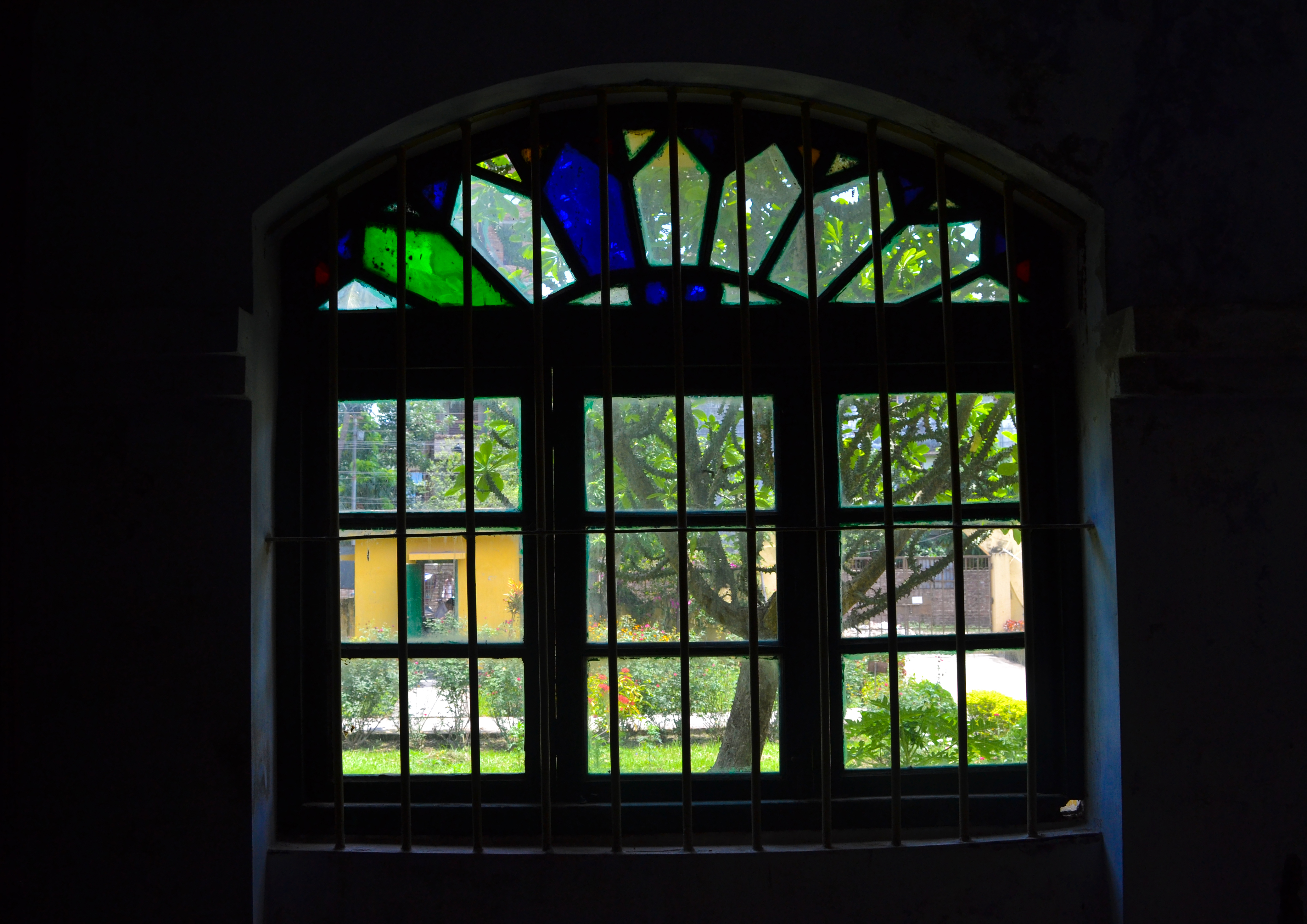 ময়মনসিংহ জাদুঘর